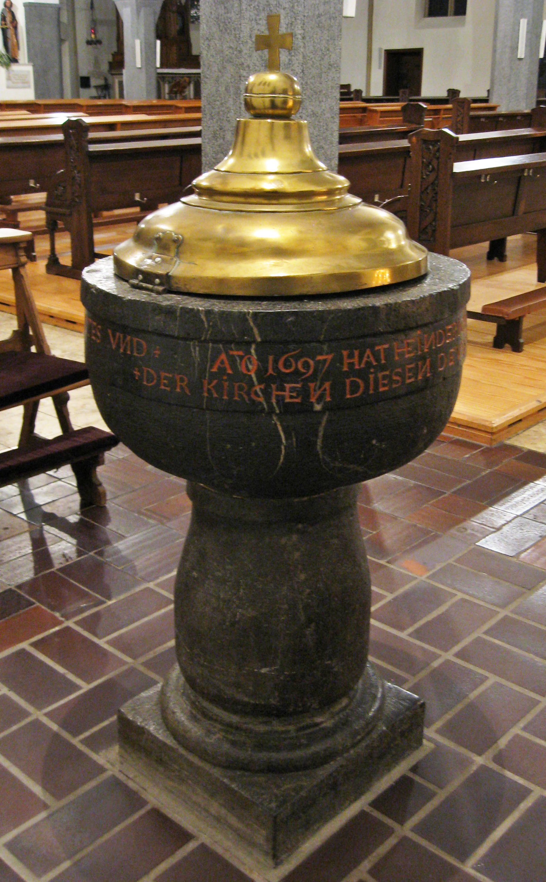 Taufbecken in der katholischen Kirche in Oidtweiler